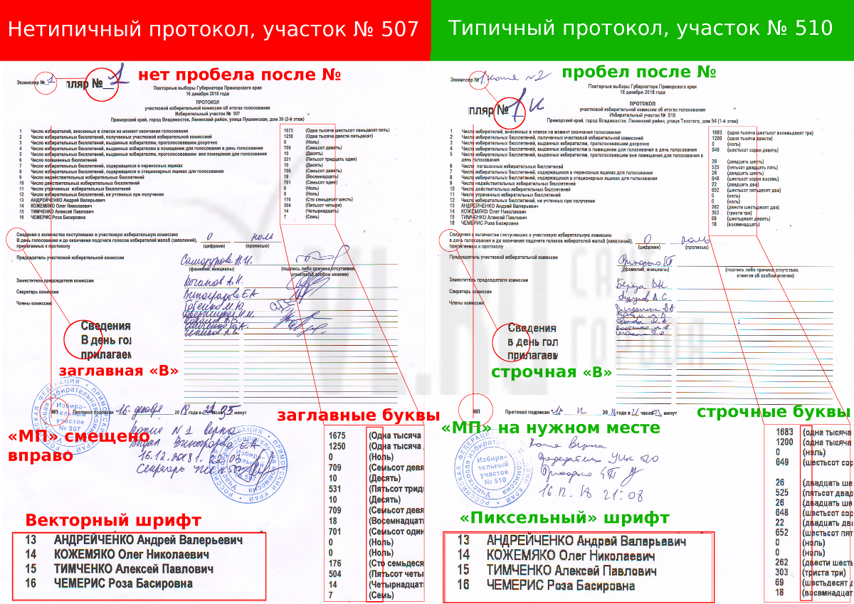 Виктор Толстогузов, один из разработчиков КОИБ, показал различия между протоколами с двух участков, оборудованных КОИБ-2010, по его экспертной оценке один из них (с участка 510) не содержит признаков подделки, а другой (с участка 507) не мог быть напечатан КОИБом.